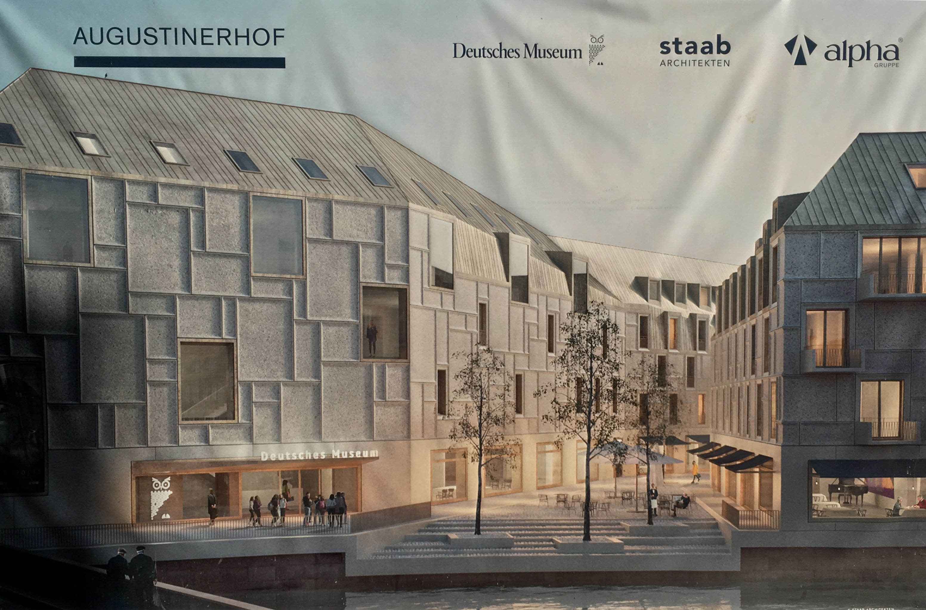 Plakat an der Baustellenwand am Augustinerhof in Nürnberg